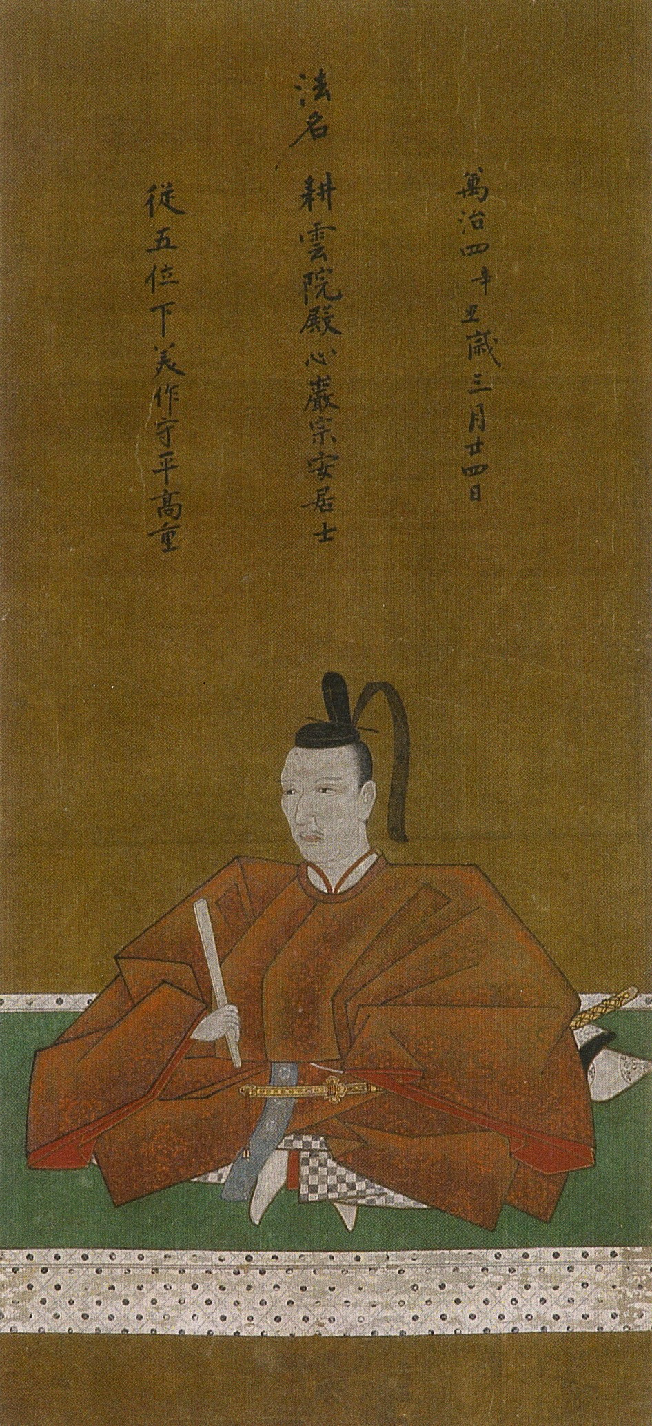 信高流高家織田氏2代当主・織田高重の肖像画。